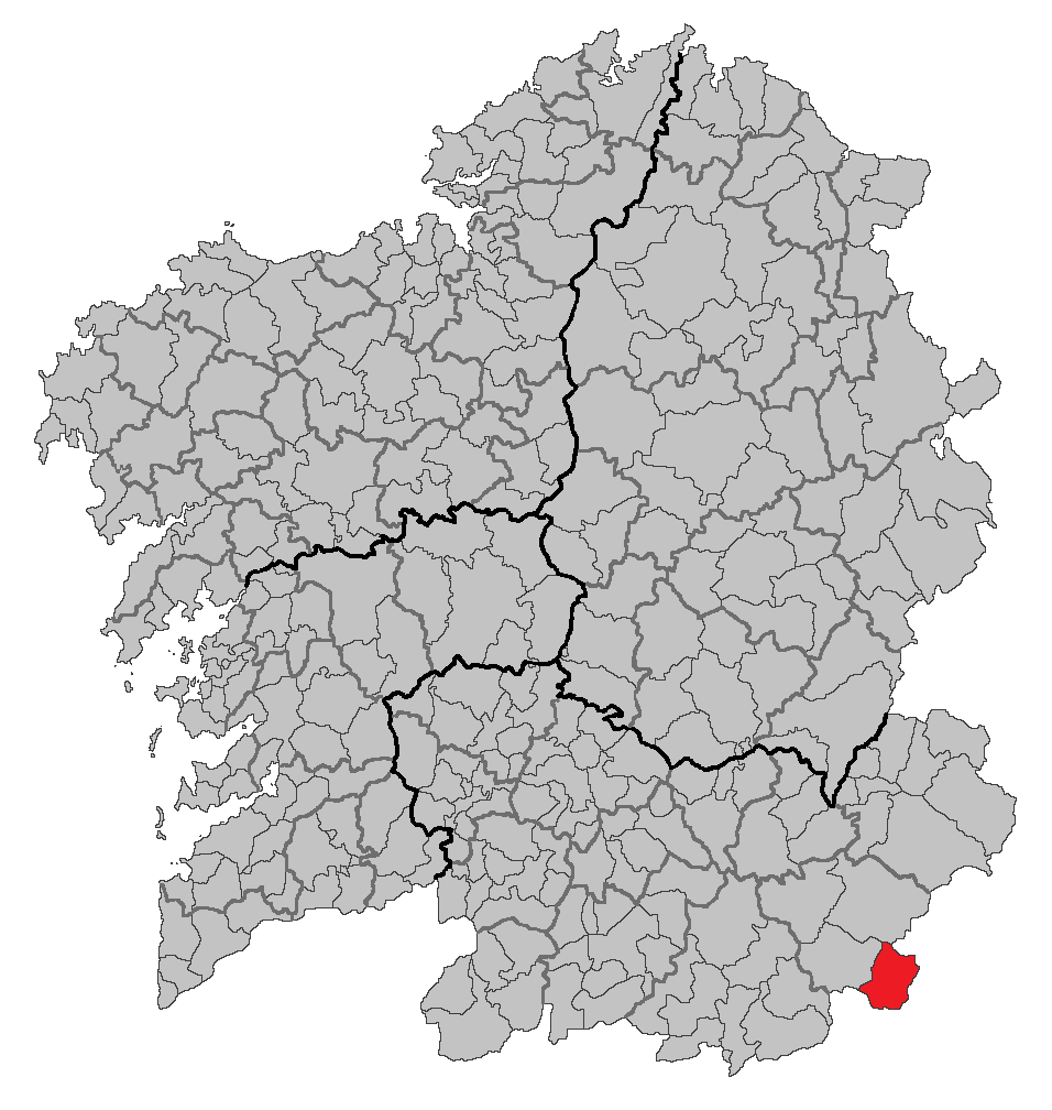 Mapa coa localización do concello de A Mezquita.